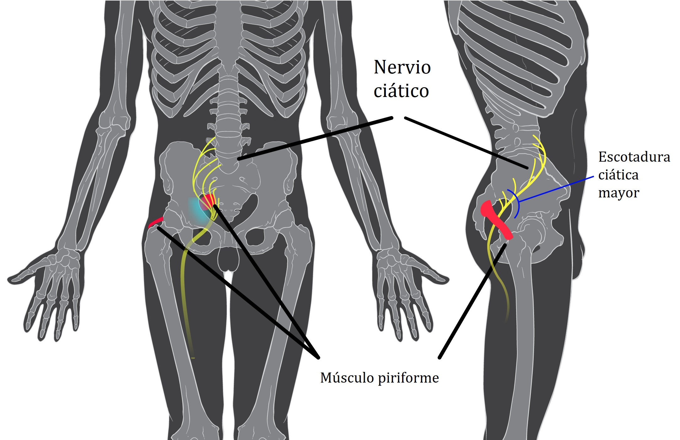 Localización anatómica del síndrome del piramidal.